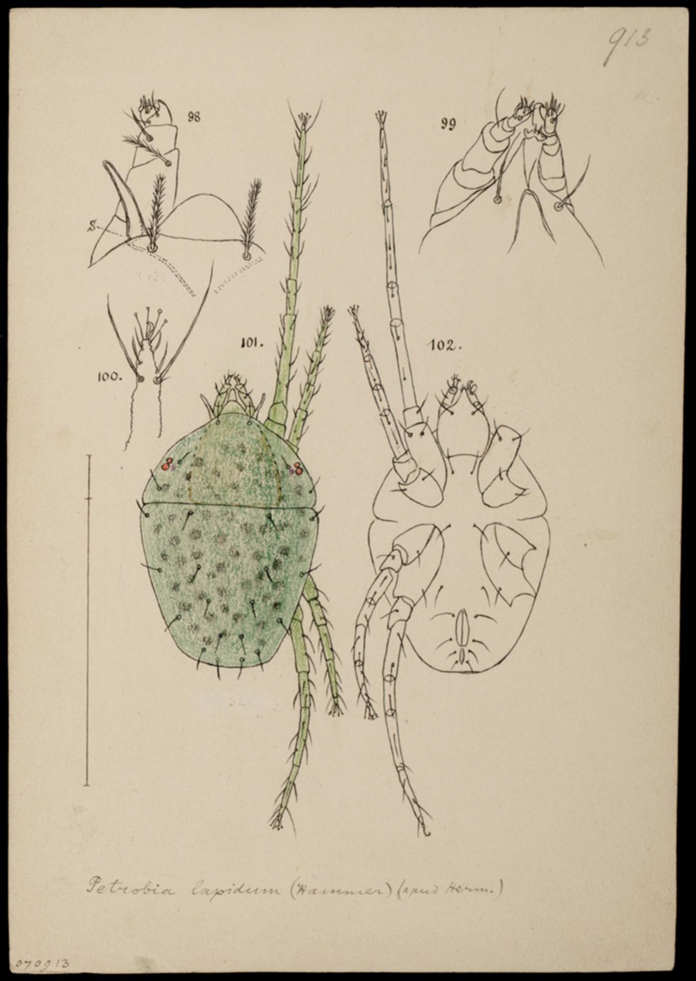 Petrobia lapidum